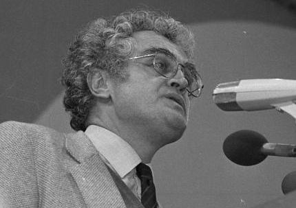 28.2.1983 SPD-Wahlkundgebung mit Kanzler-Kandidat Dr. Hans-Jochen Vogel in der Kölner Sporthalle